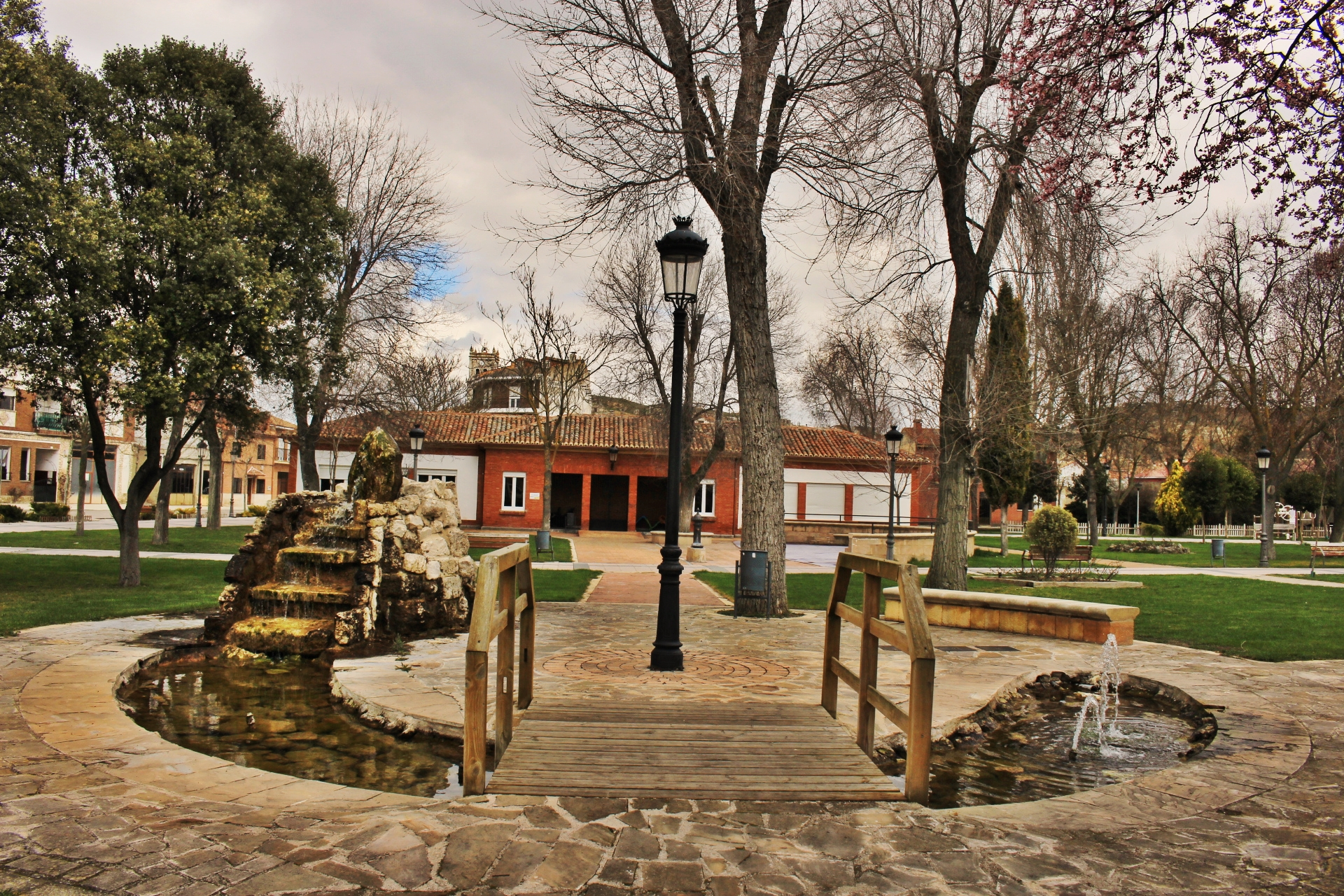 Parque de la Carolina